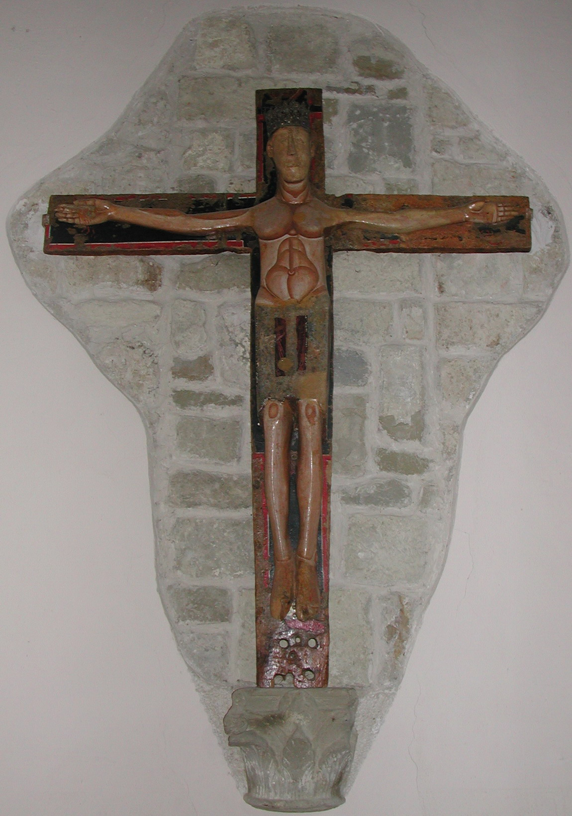 Crocifisso ligneo policromo, Arquata del Tronto, agosto 2006